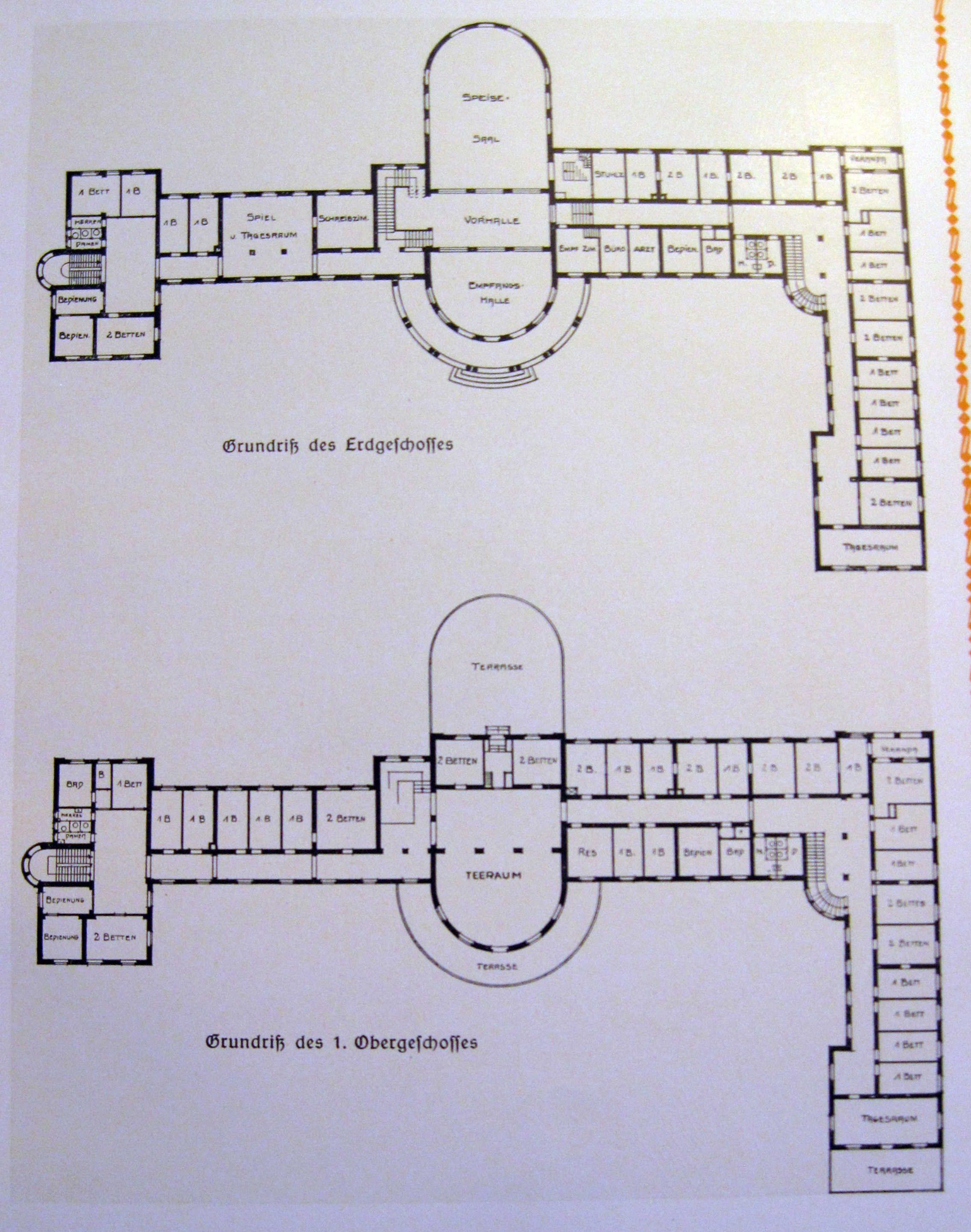 Grundrisse aus der Zeit vor 1925